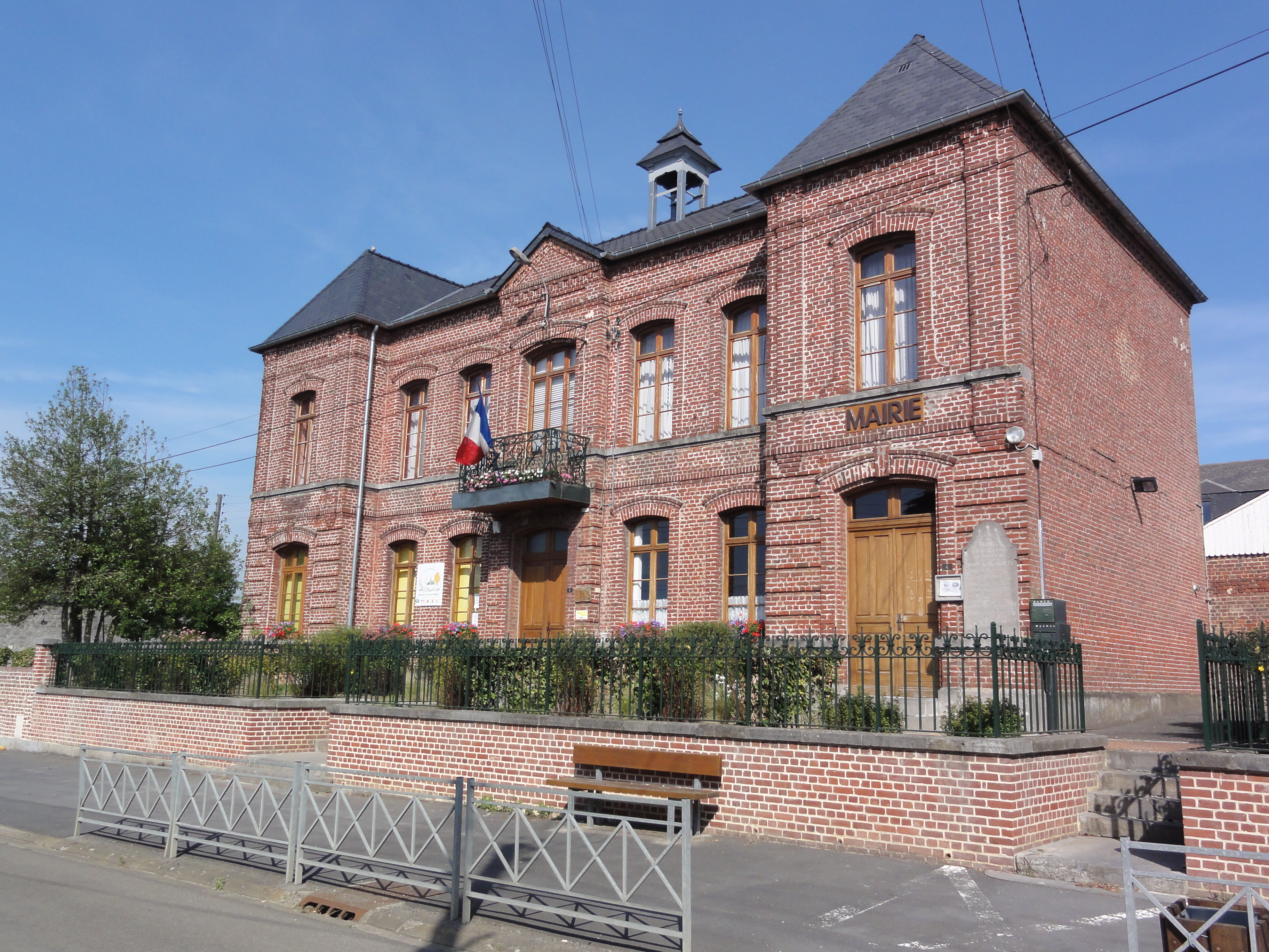 Saint-Hilaire-sur-Helpe (Nord, Fr) mairie